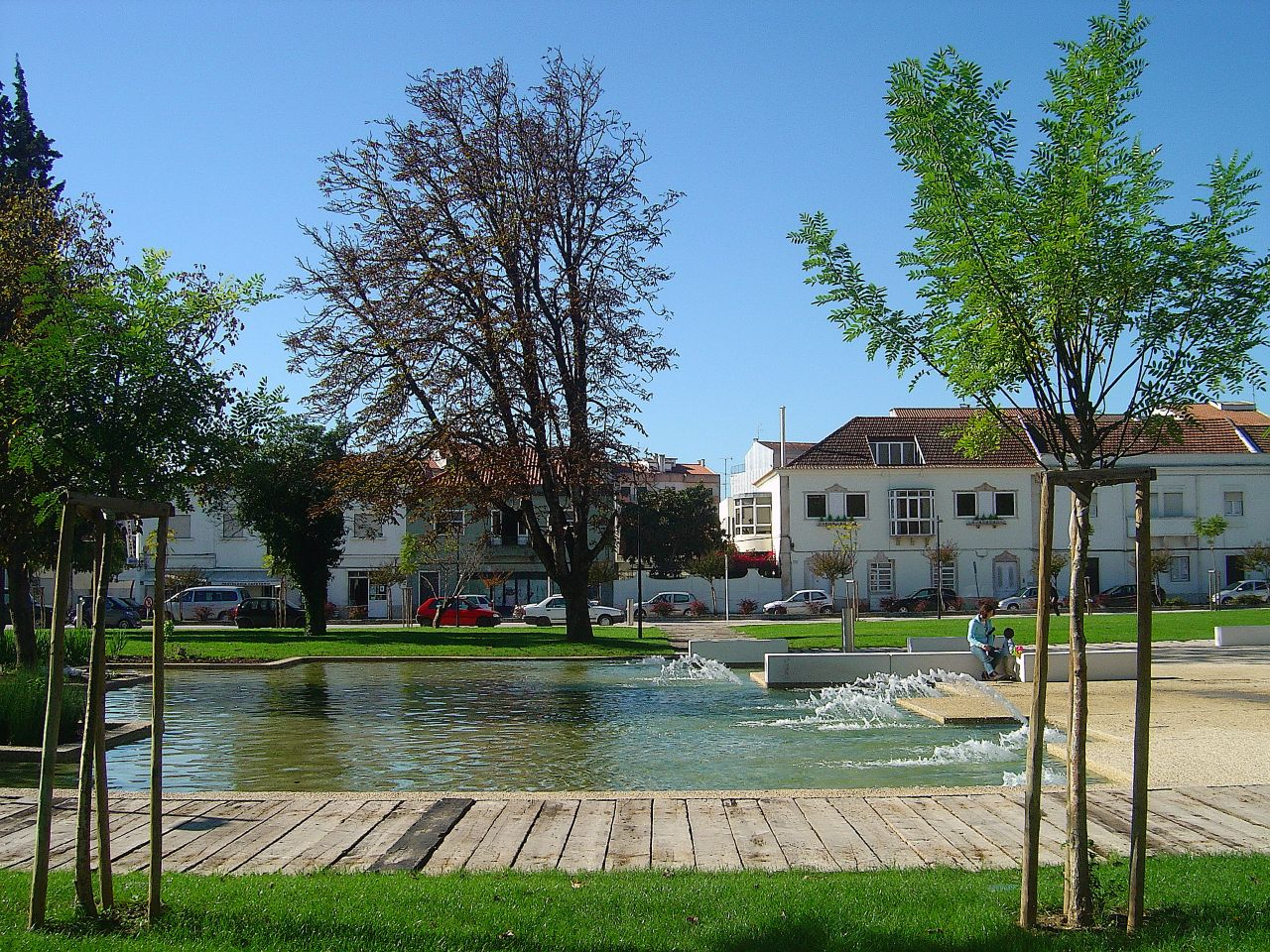 Rio Maior